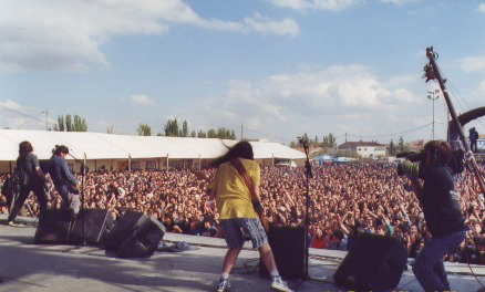 Festival de Arte Nativo Viña Rock 2001, Villarrobledo (Albacete, España)